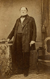 Эдуард Фридрих Пёппиг